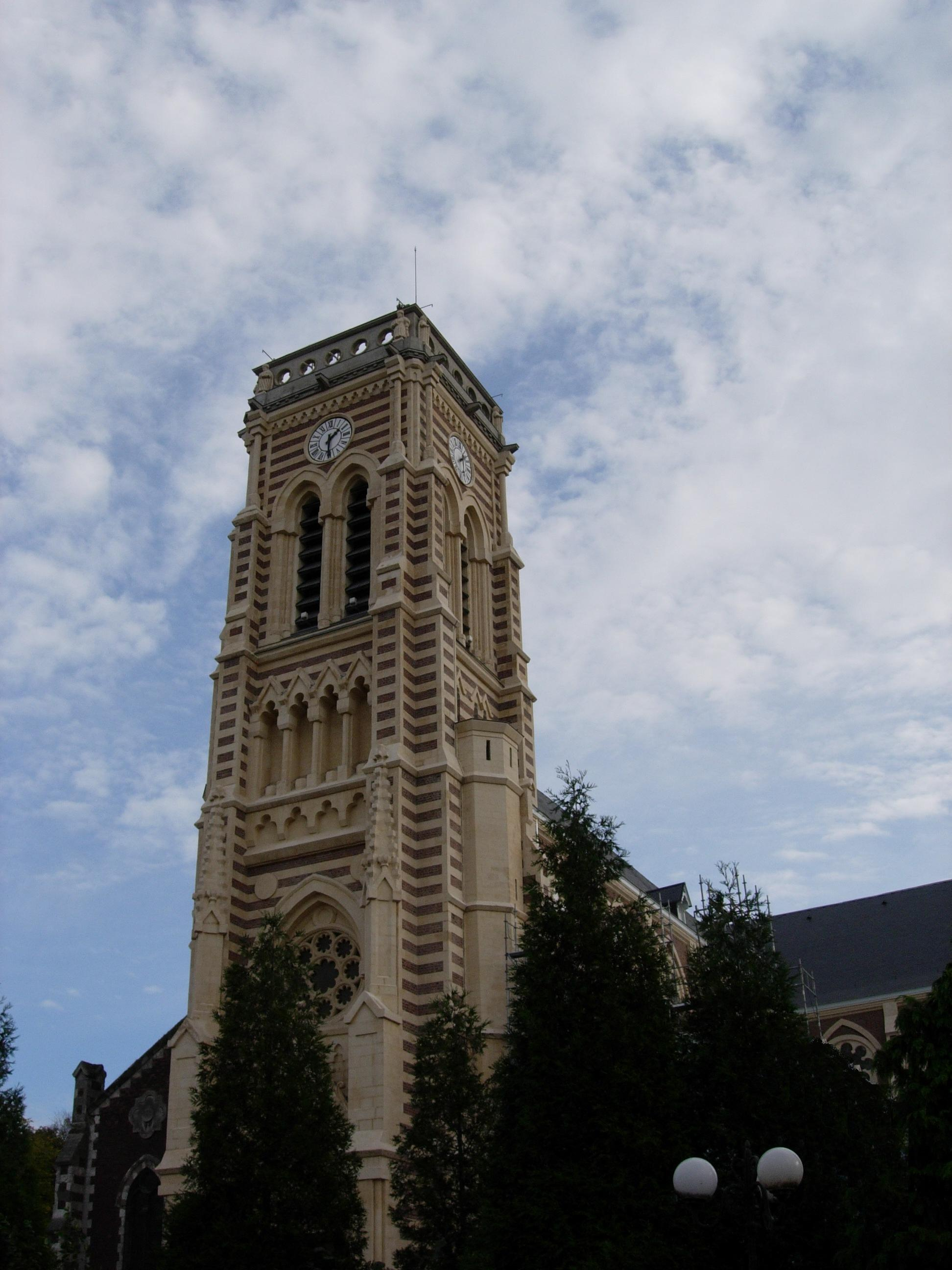 Église Saint-Maclou (Haubourdin, France)